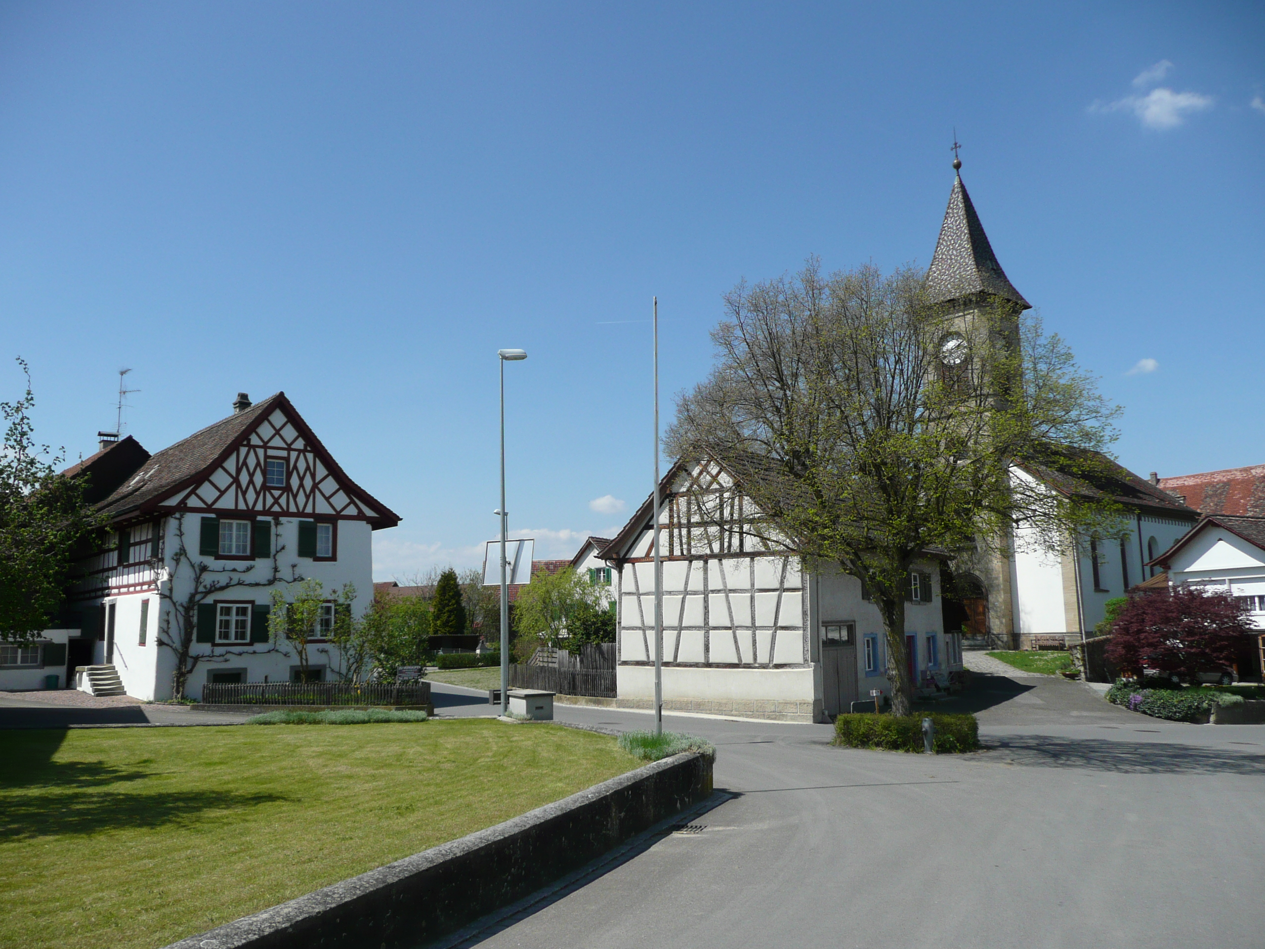 Dorfplatz und Kirche in Buch SH.